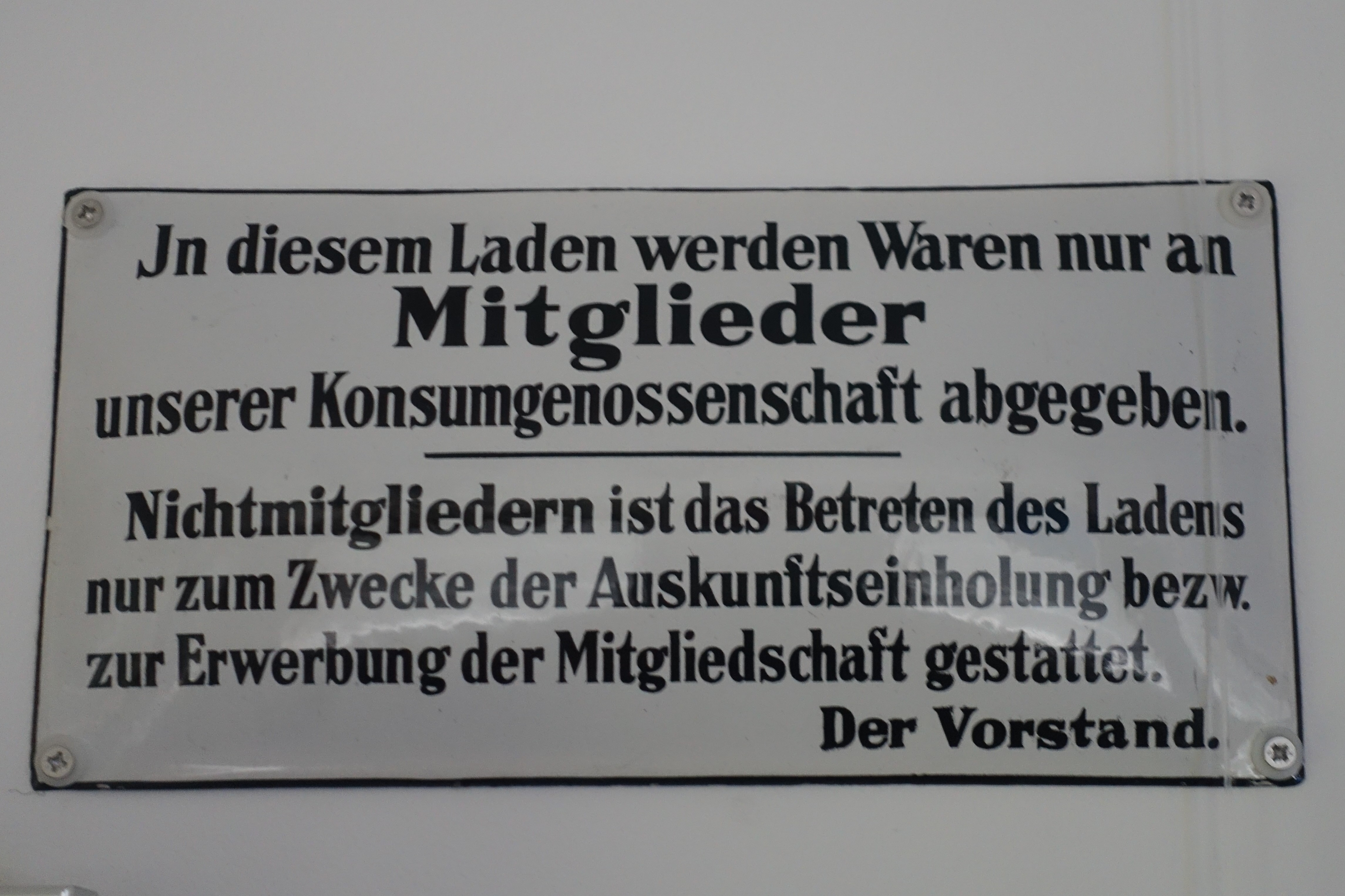 Emailleschild in den Verkaufsstellen der Konsumgenossenschaftgen um etwa 1925